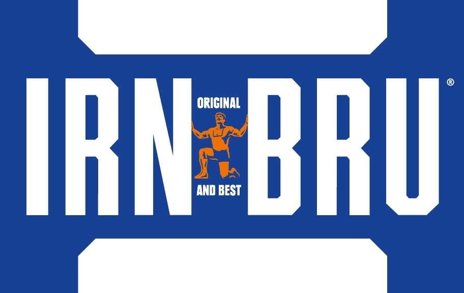 Логотип Irn-Bru